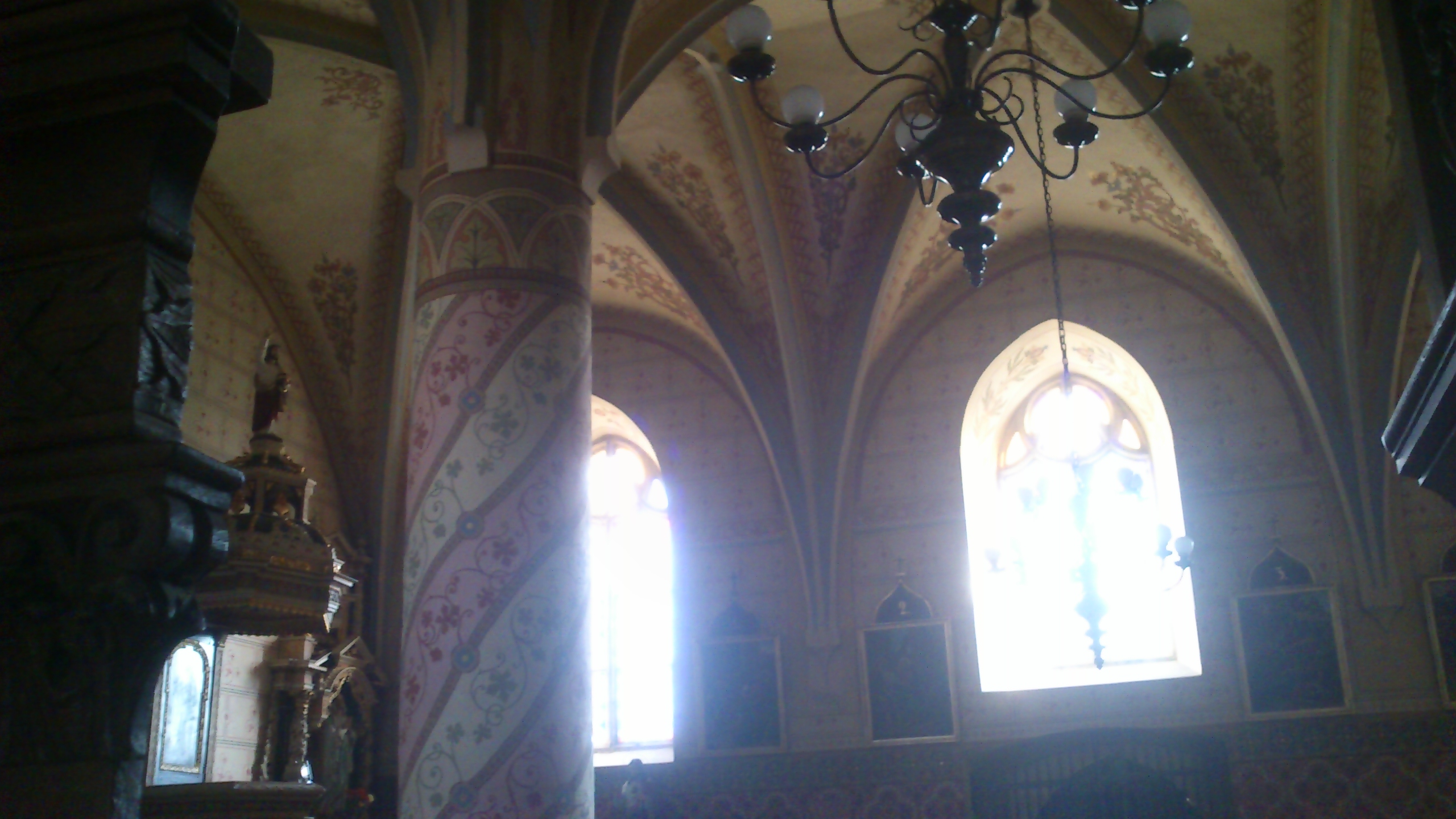 Kostel sv. Jakuba Většího (Přepeře)